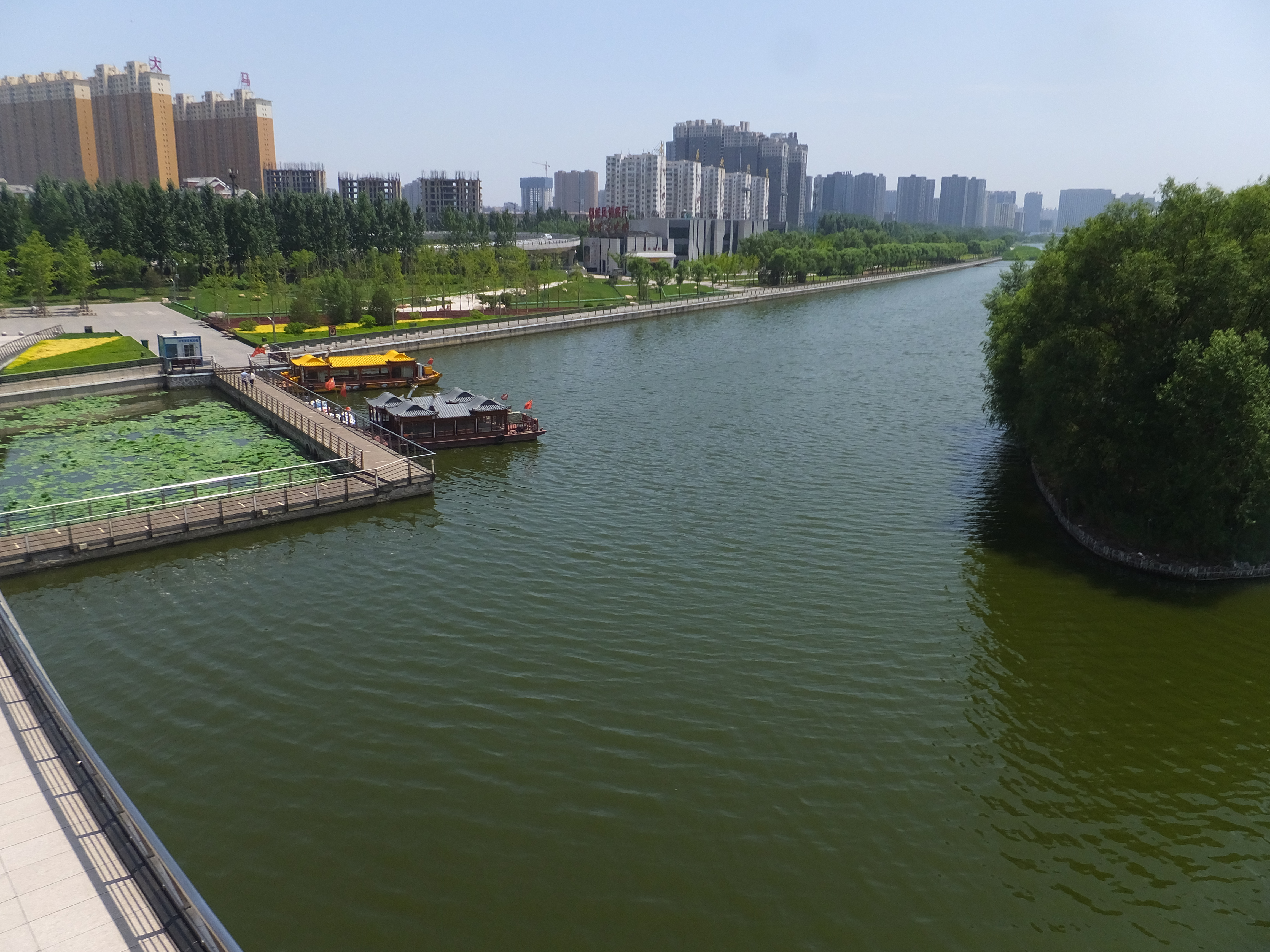 汾河 Fen River